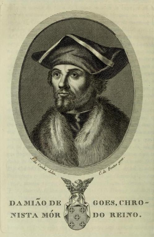 Damião de Góis (?-14??-1515), Cronistas-mor do Reino de Portugal.